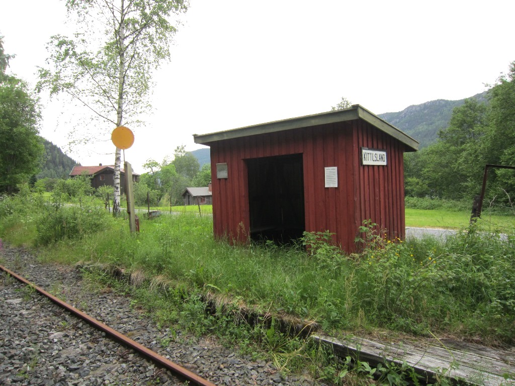 Kittilsland (eller Kittelsland) holdeplass holdeplass på Numedalsbanen